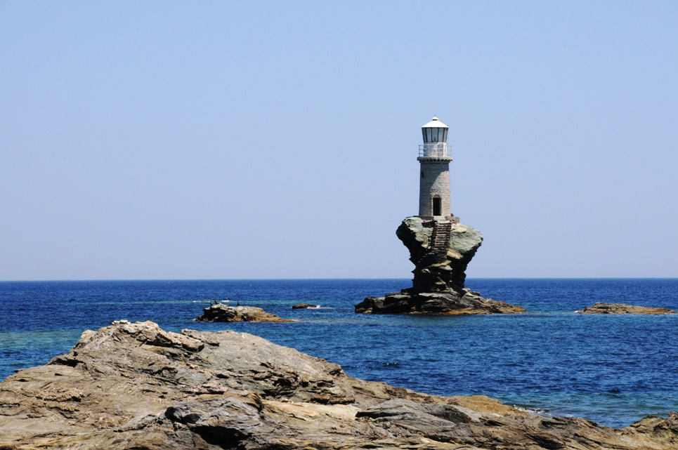 Leuchtturm von Tourliti (Φάρος Τουρλίτης) vor Andros (Άνδρος), Kykladen, Ägäisches Meer, Griechenland